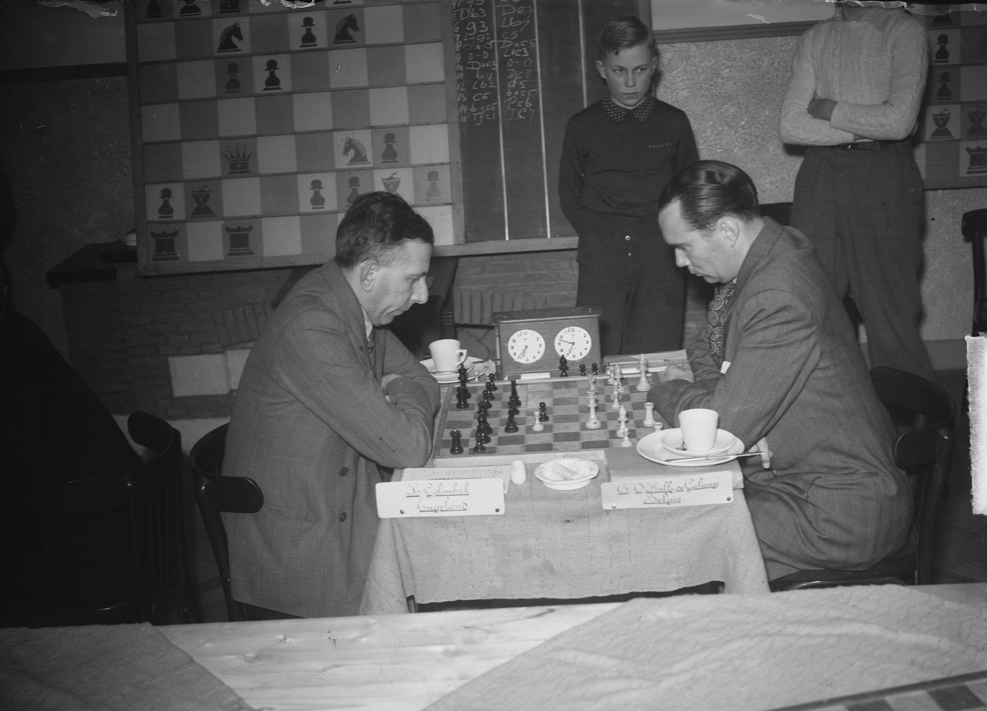 Collectie / Archief : Fotocollectie Anefo Reportage / Serie : [ onbekend ] Beschrijving : Hoogovens schaaktoernooi Datum : 9 januari 1949 Trefwoorden : schakers Fotograaf : Oorschot, […] van / Anefo Auteursrechthebbende : Nationaal Archief Materiaalsoort : Glasnegatief Nummer archiefinventaris : bekijk toegang 2.24.01.09 Bestanddeelnummer : 903-1810